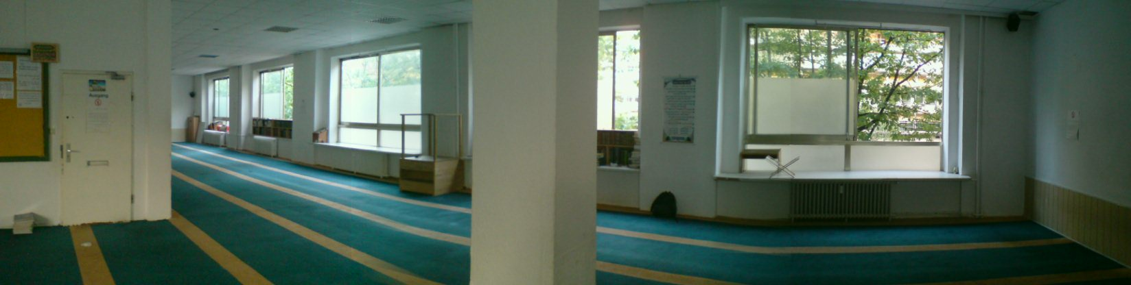 Panoramabild der Quds-Moschee, 1. Stock, Männerraum von innen in Richtung Fenster. Man kann gut das Podest für die Predigt erkennen.